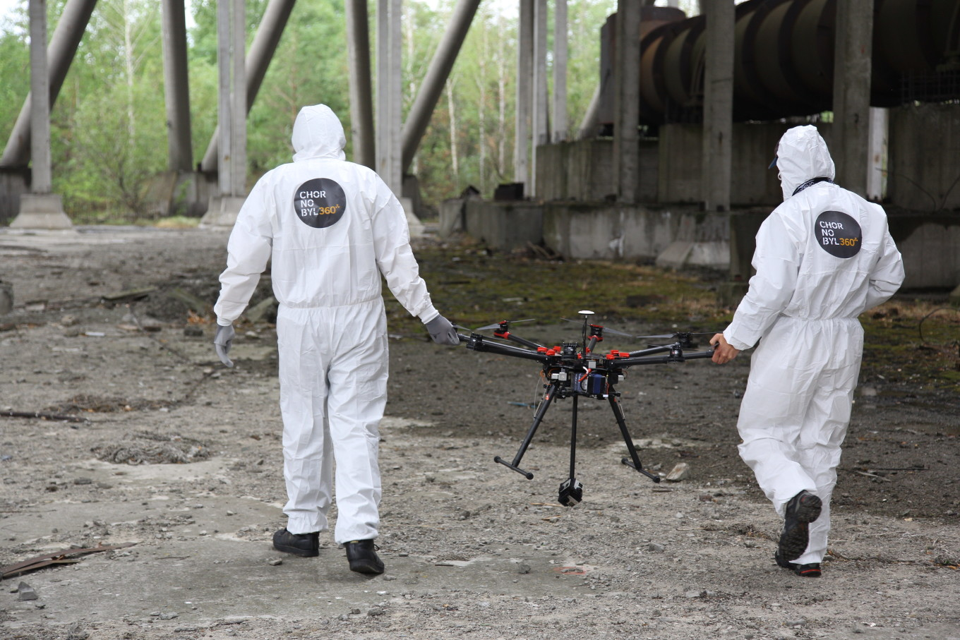 Команда проекту Chornobyl360 за роботою